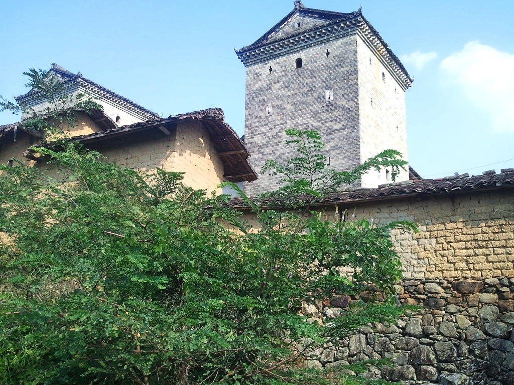 紫金群丰村四角楼(宝安楼)20121002